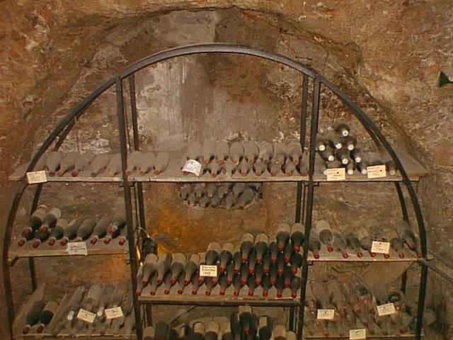 Roma, via Appia Antica, cantina di lusso in una tomba romana by Lalupa